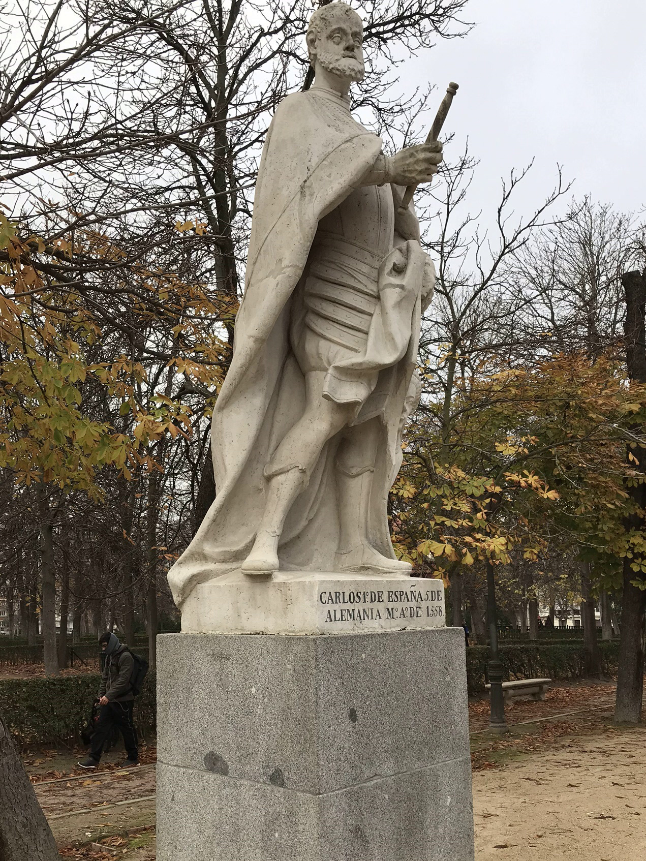 Karl V als Carlos I erster König von Spanien, Statue im Retiro-Park in Madrid.